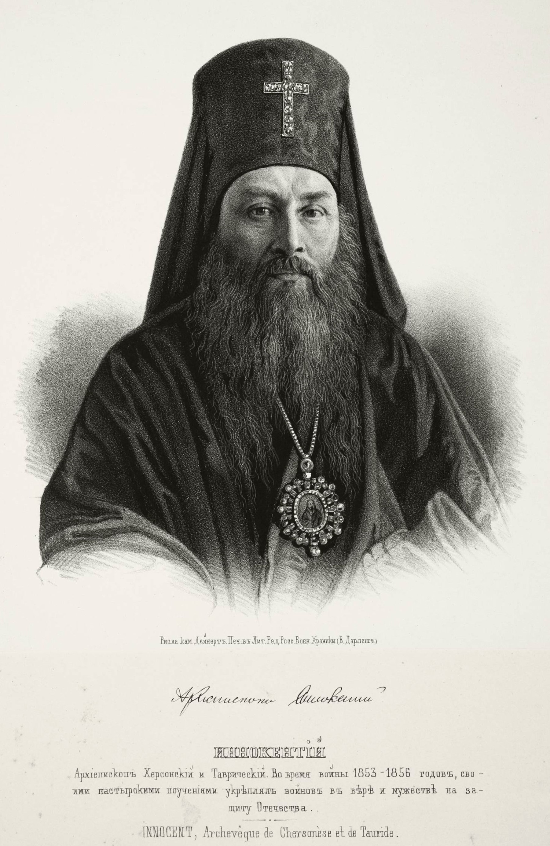 Иннокентий (Борисов), Архиепископ Херсонский и Таврический